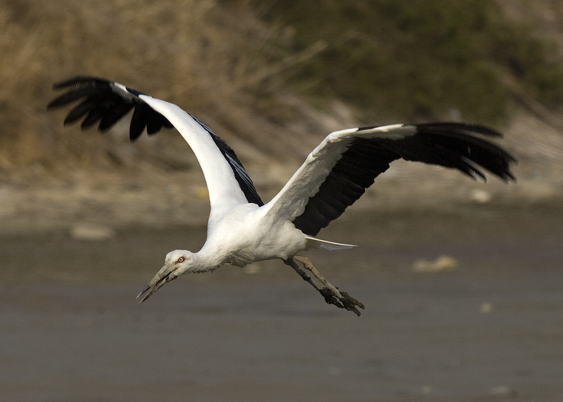 コウノトリ 香川県丸亀市